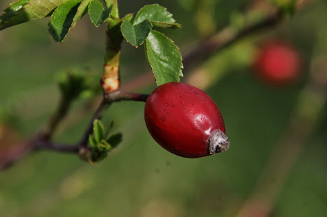 Egy csipkebogyó látható a képen, májusban készült kép.